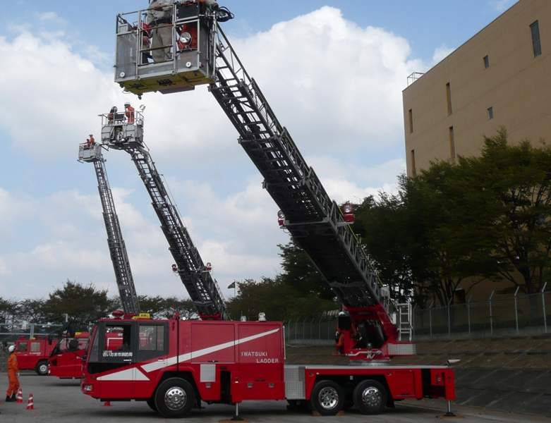 さいたま市消防局のはしご車。